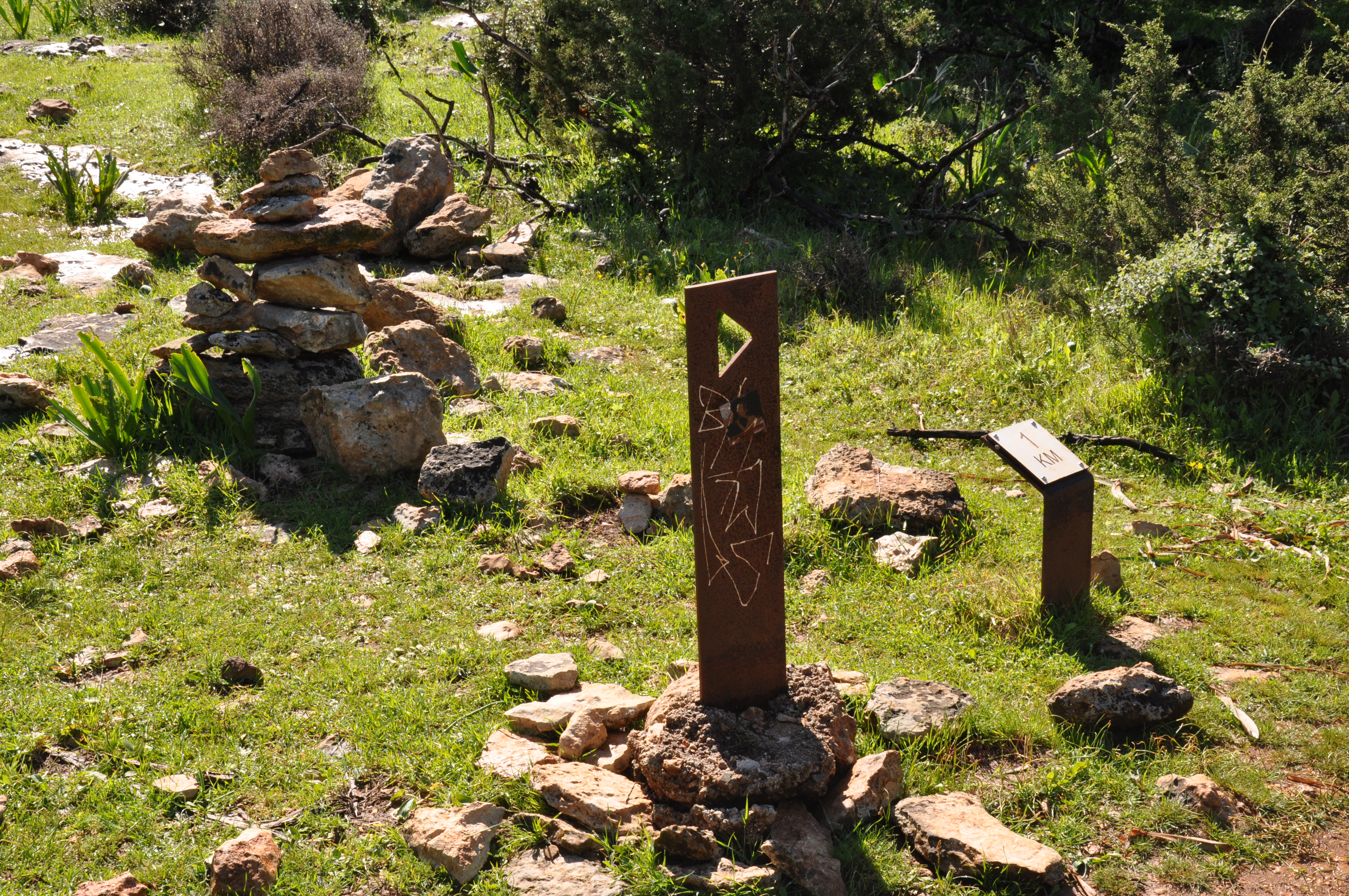 Дороговказ, НП «Акамас»